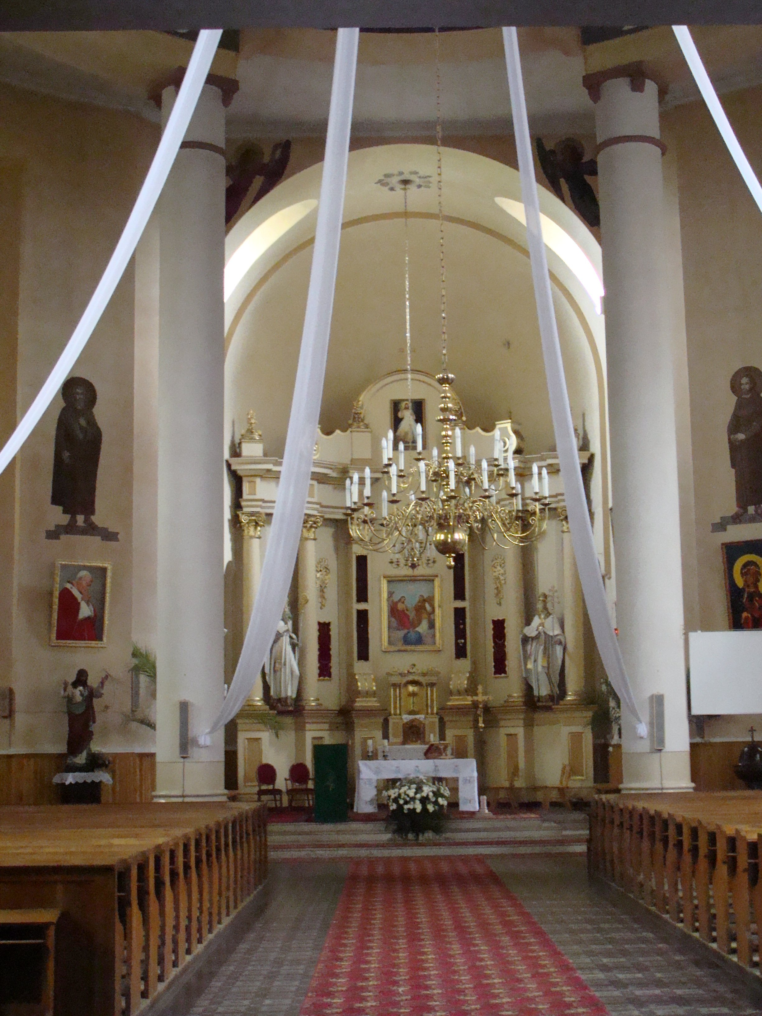 Wnętrze kościoła w Fałkowie